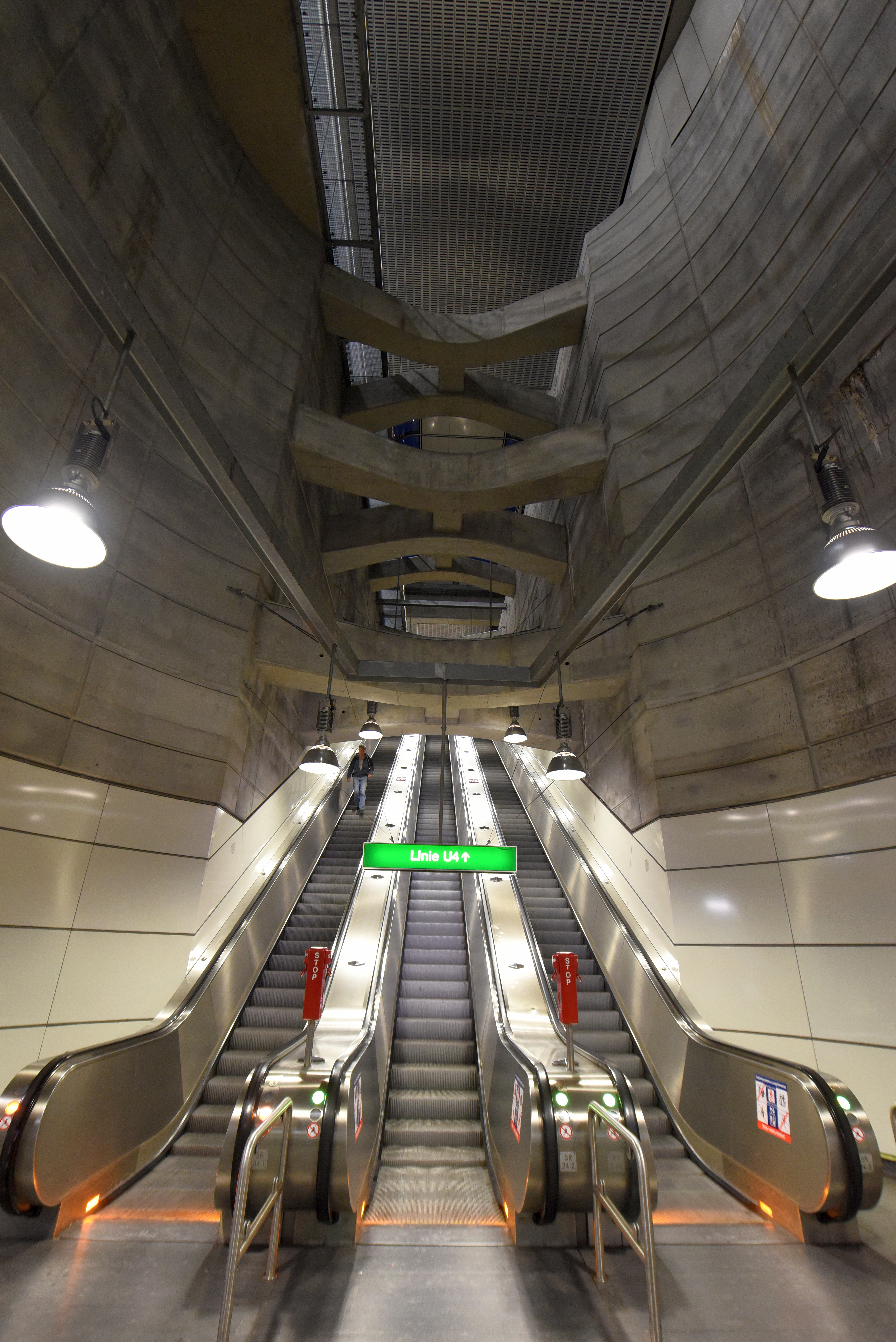 Rolltreppenanlage in der U-Bahn-Station Schottenring, Wien